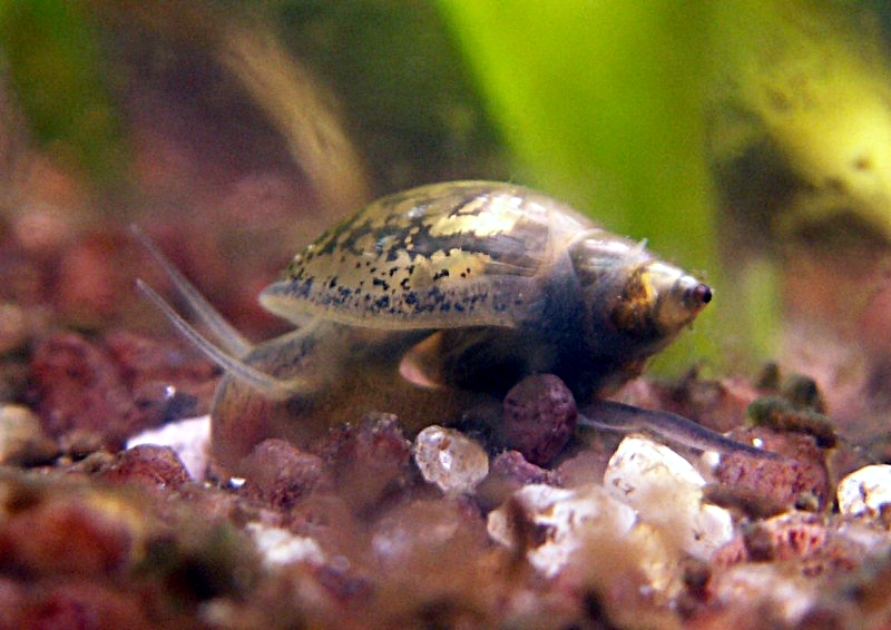 Blasenschnecke (Original text: Blasenschnecke, aufgenommen im Aquarium)